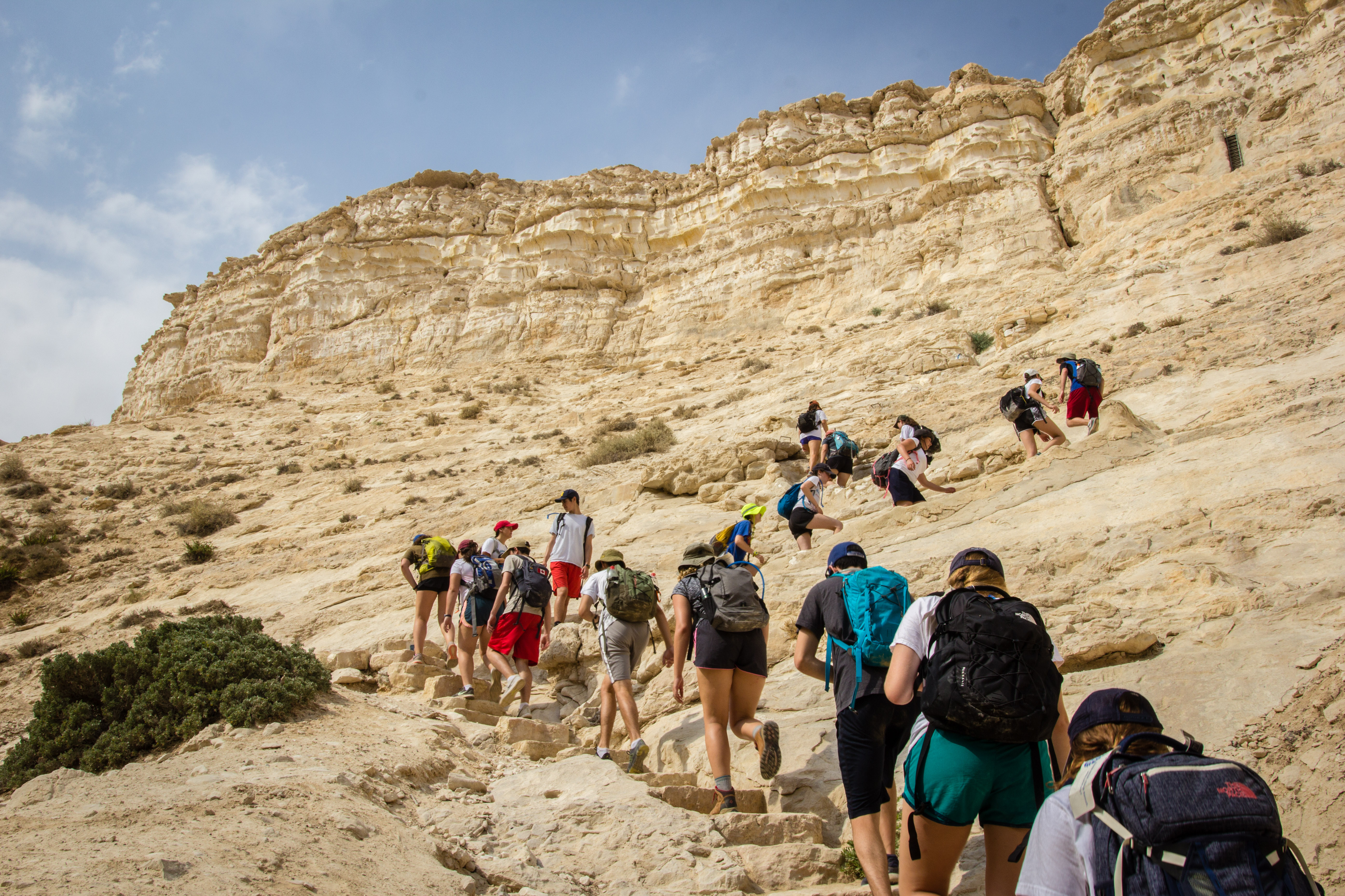 עין עבדת הוא מעיין בהר הנגב, הנובע בנחל עבדת, מיבליו של נחל צין.